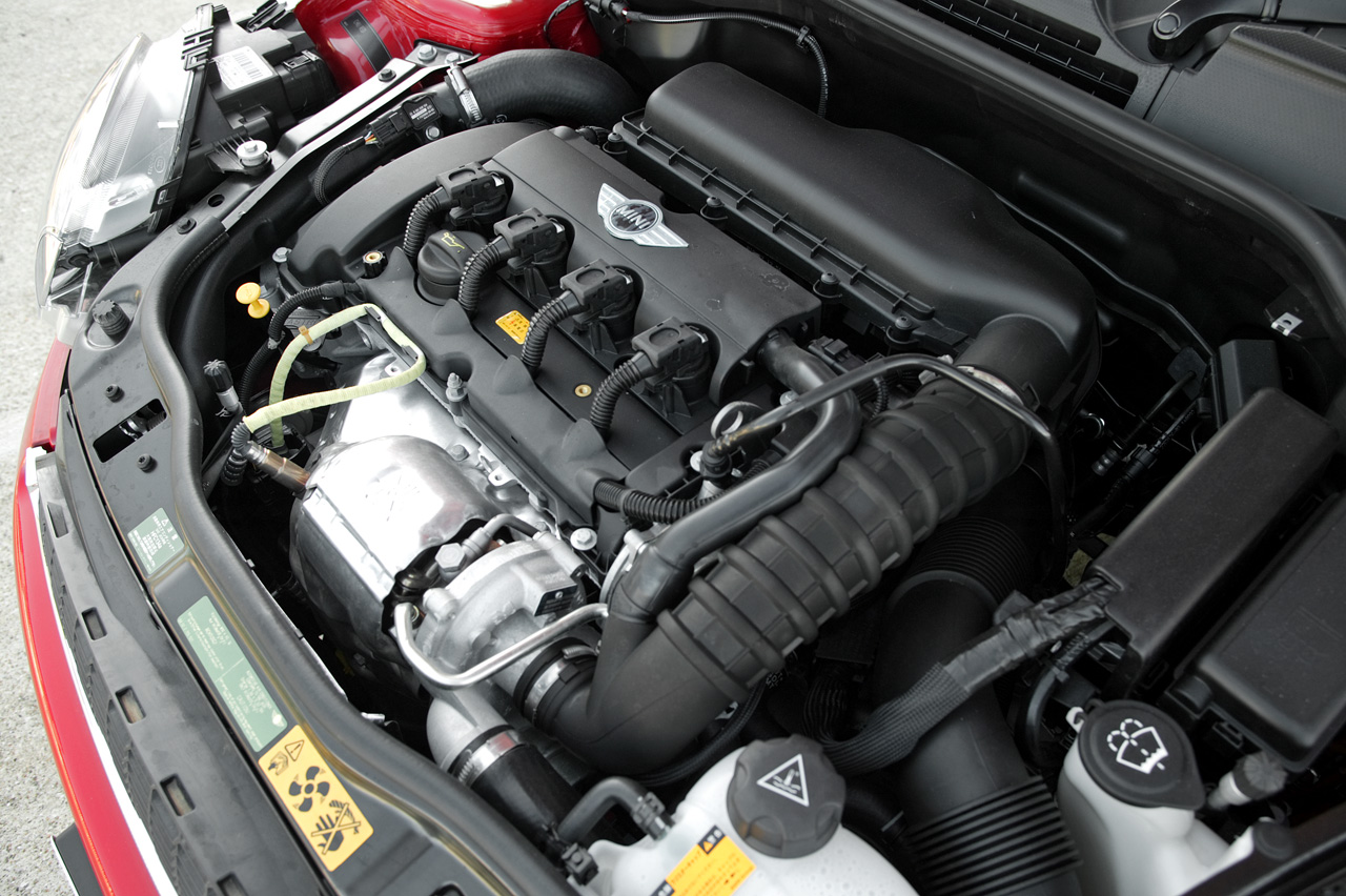 '07 MINI Cooper S turbo engine